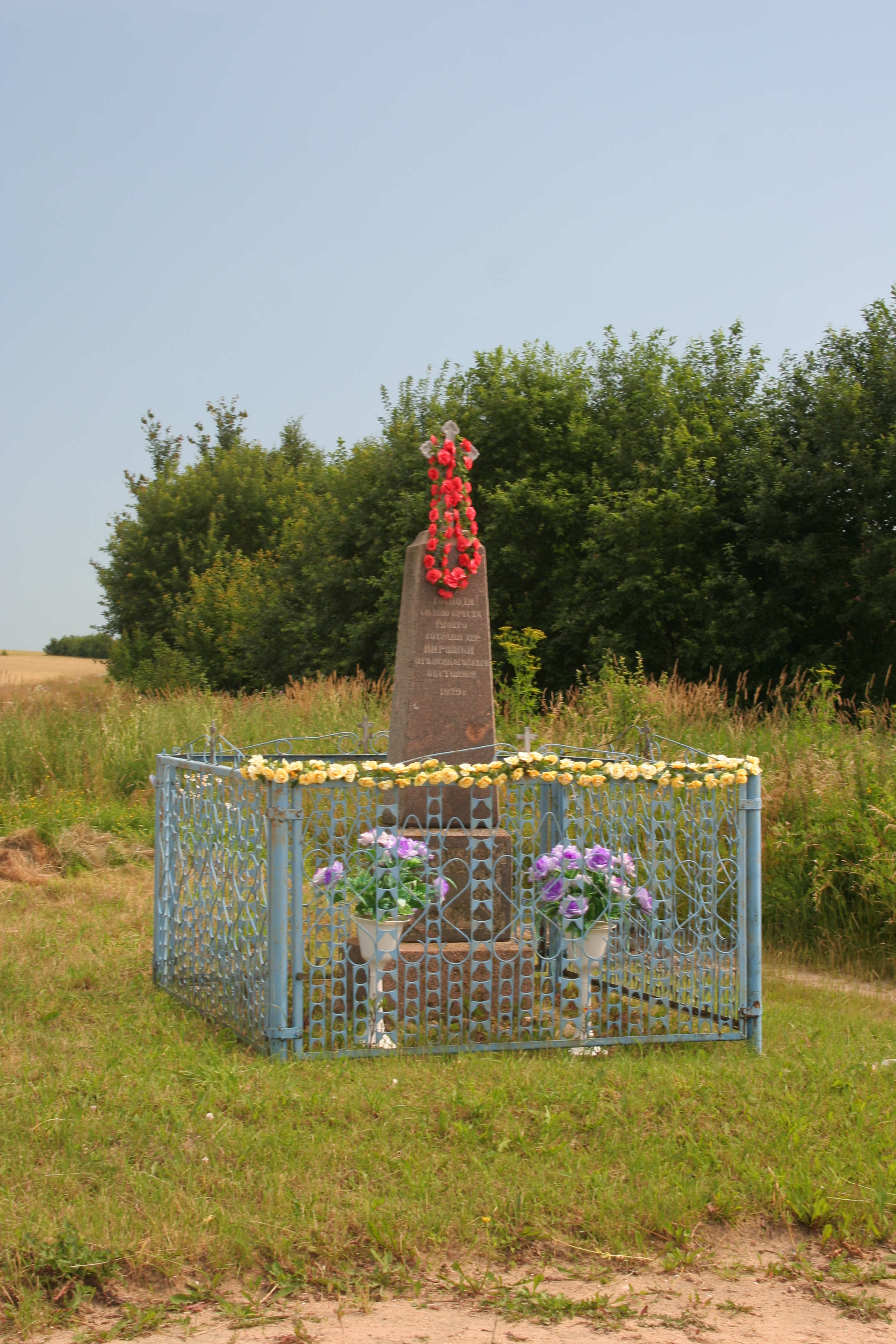 Krzyż przydrożny niedaleko wsi Pierożki.